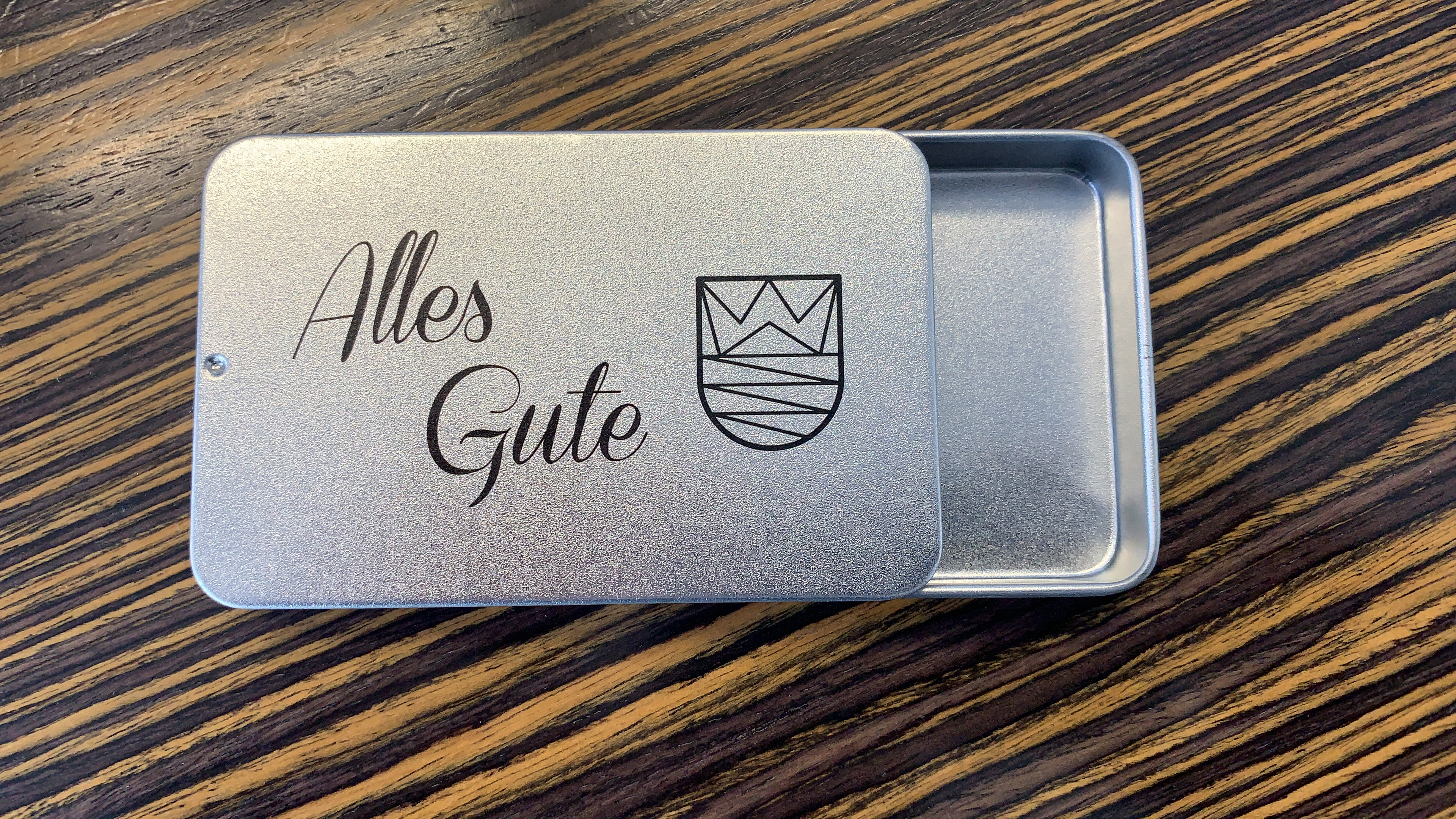 Einfärbiger UV Druck auf Metall